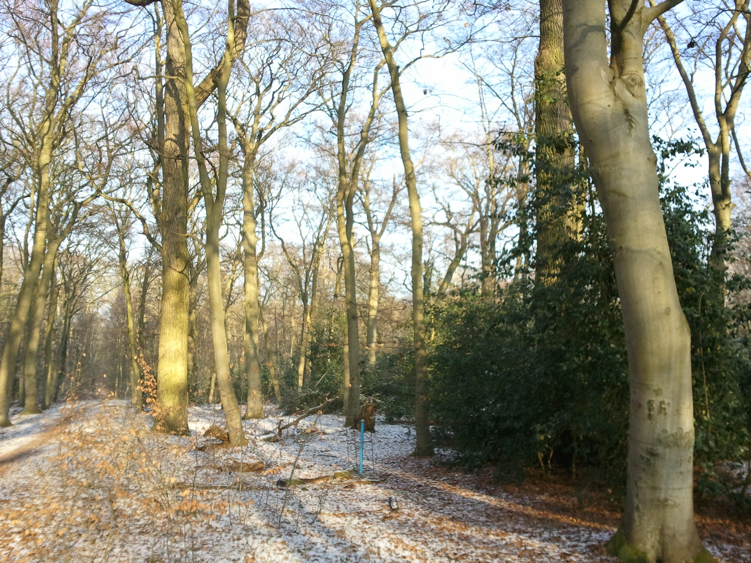 Stieleichen und ein Grundwasserpegel